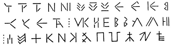 Gyergyói fajegyek